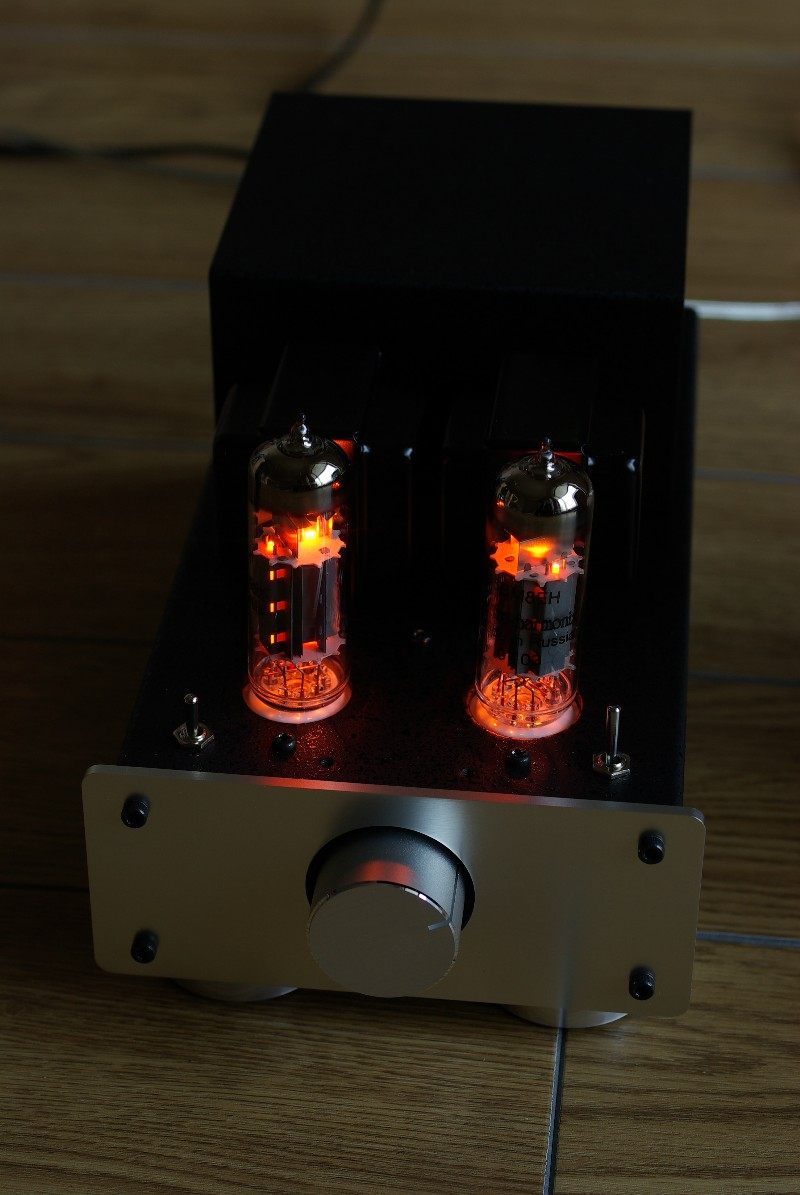 MT管使用の代表的パワーアンプ、イーケイジャパン社製TU-870。